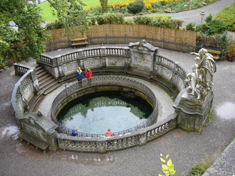 Donaubachquelle in Donaueschingen von oben